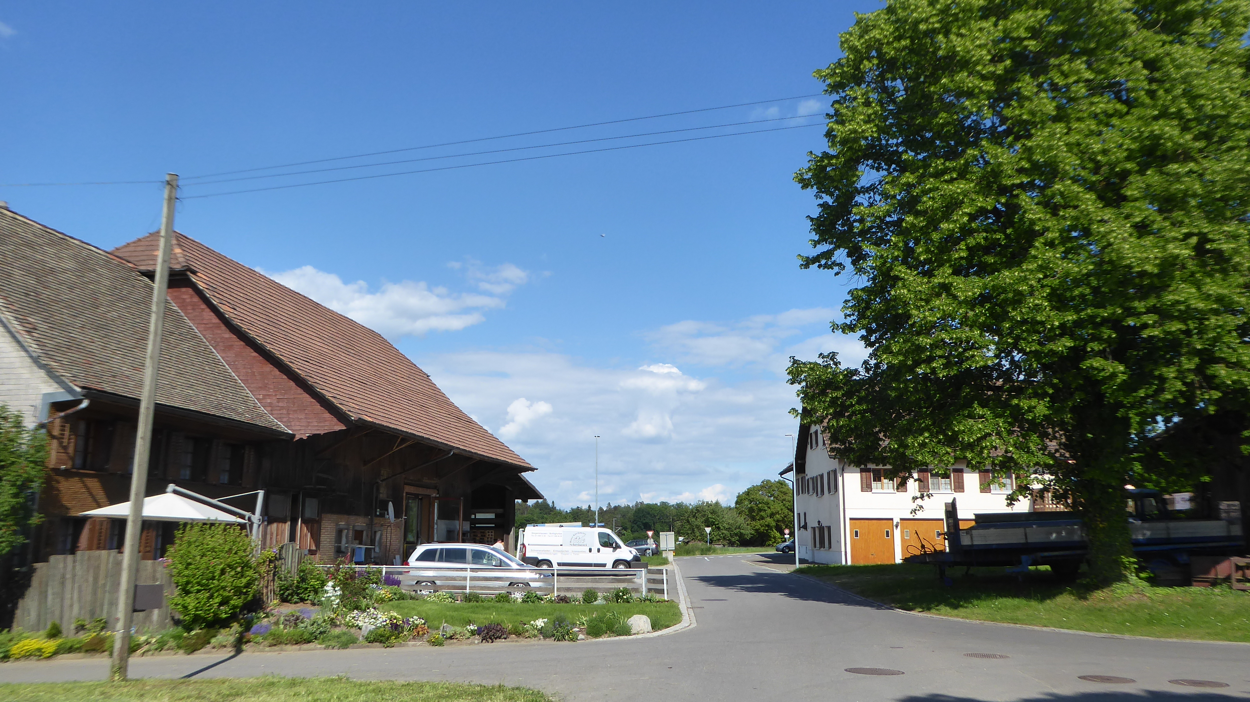 Oftershausen